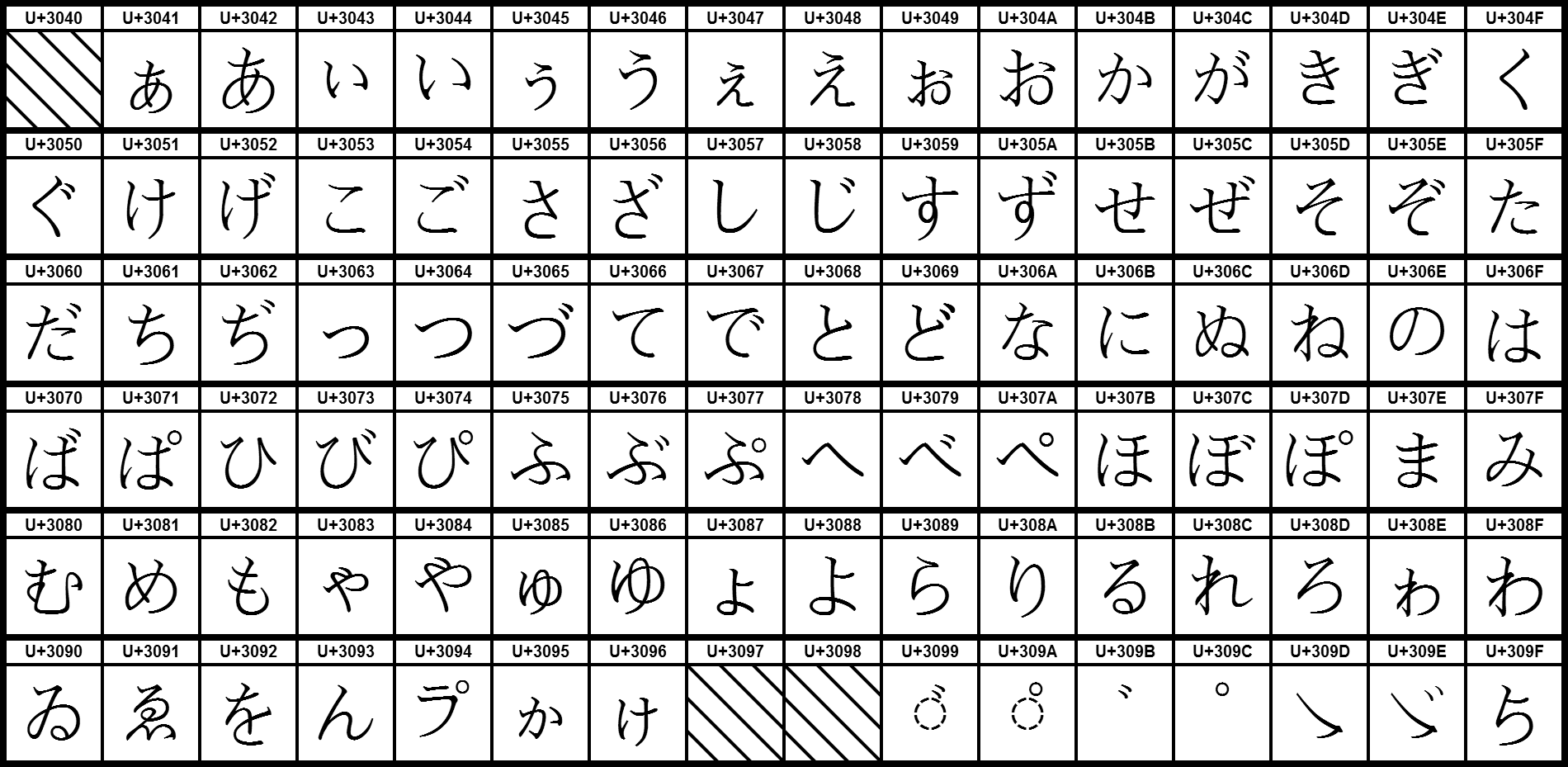 Grafiktafel für den Unicodeblock Hiragana. Schraffierte Felder sind unbesetzte Codepoints.